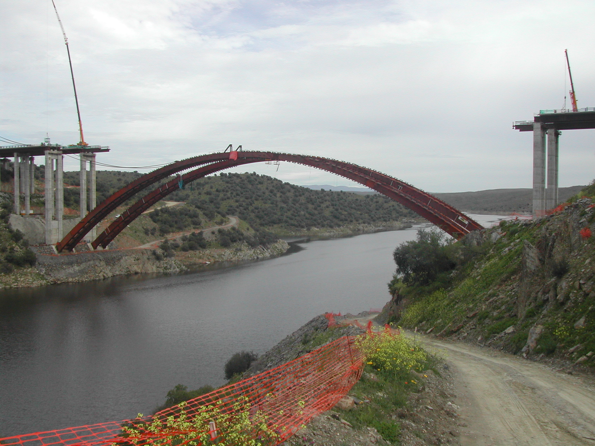 Construcción del puente de arco de hormigón sobre el río Tajo en la A-66, provincia de Cáceres.